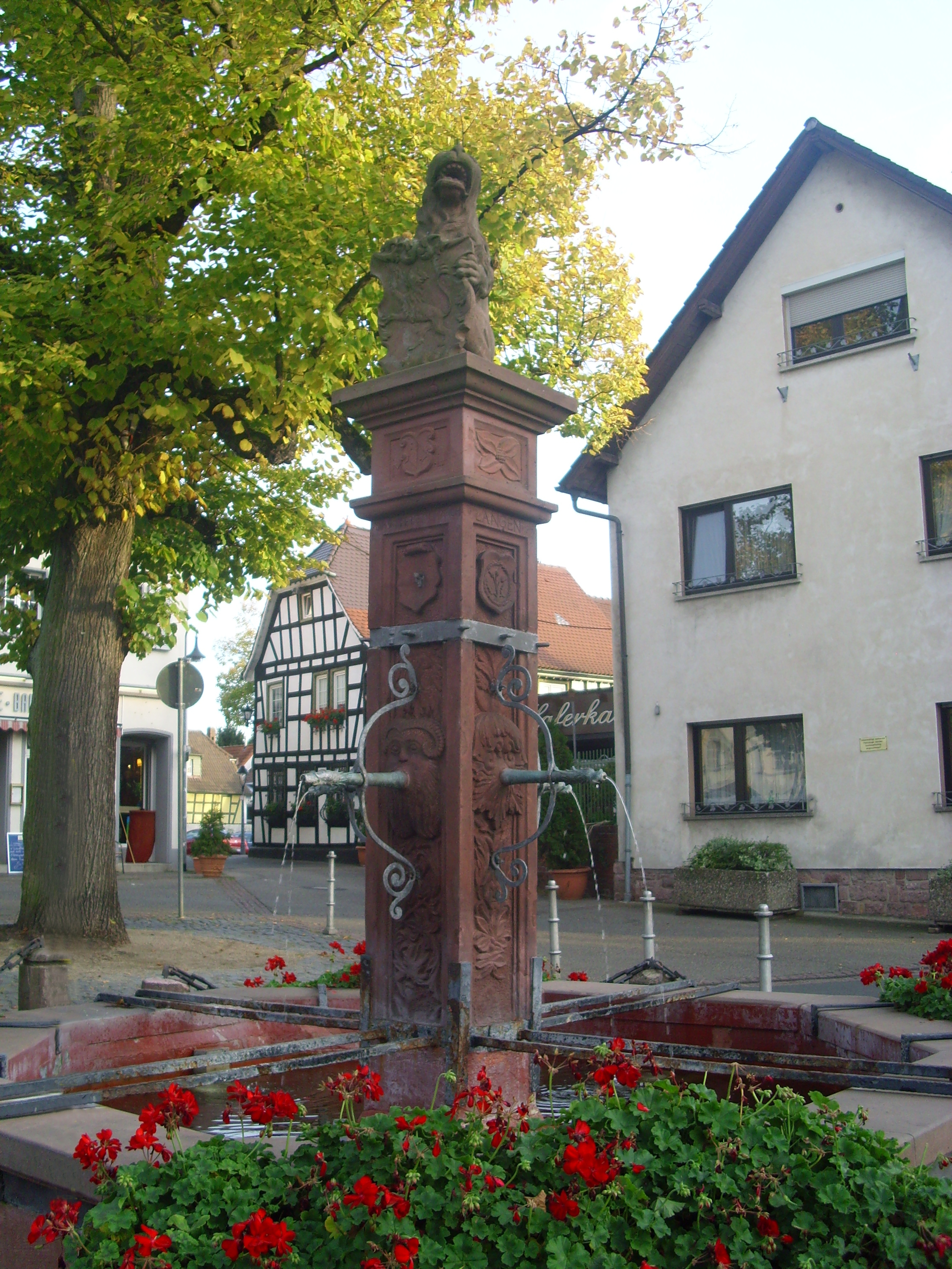 Schon 1553 brachte der Brunnen Wasser aus dem Mühltal. Seit der Einbindung in Hessen ziert ihn ein steinerner Löwe